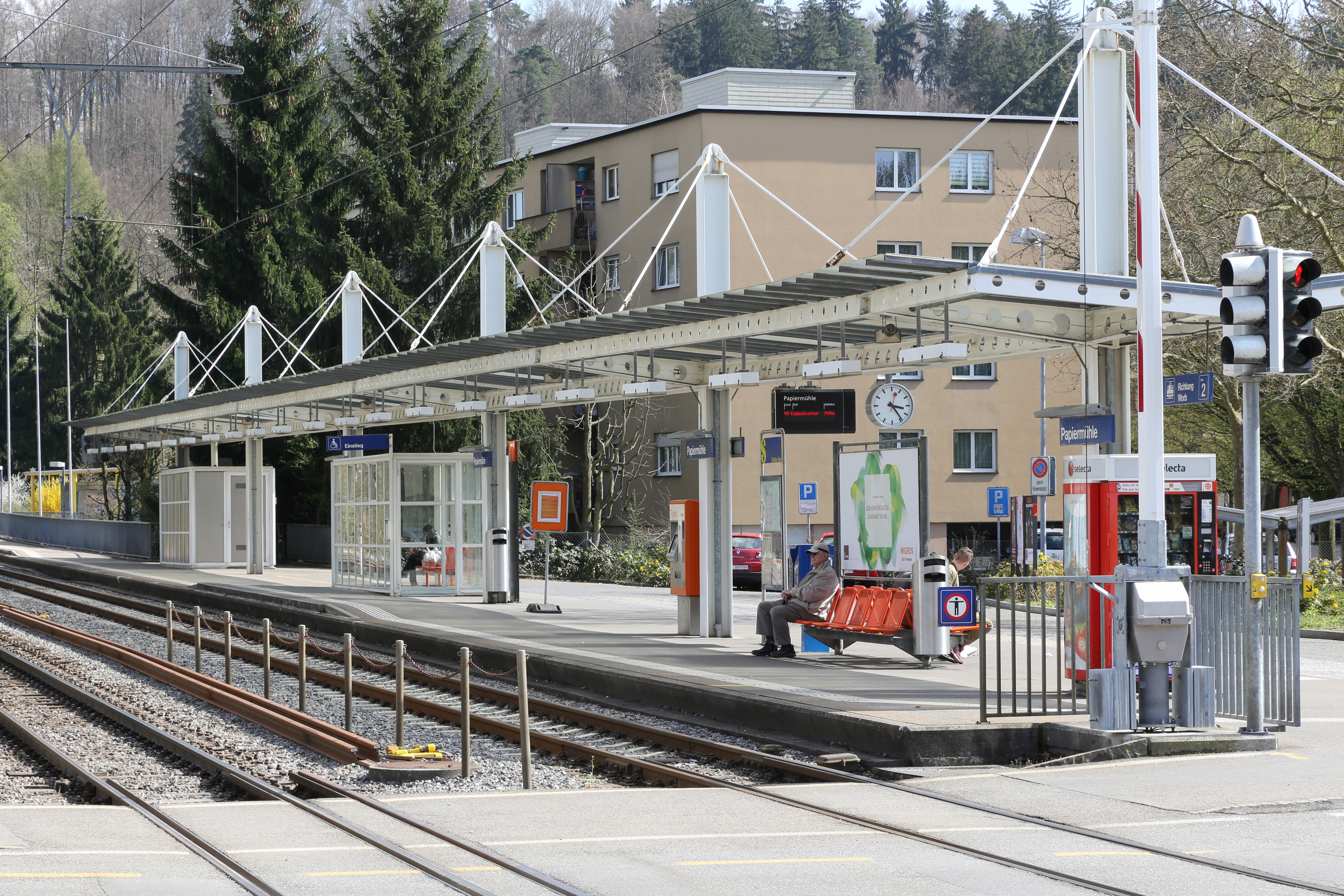 RBS-Bahnhof Papiermühle in Ittigen, Haltestelle für in Richtung Worb fahrende Züge